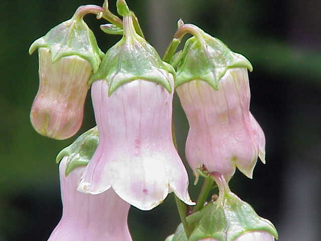 Species: Azorina vidalii Family: Campanulaceae Image No. 2